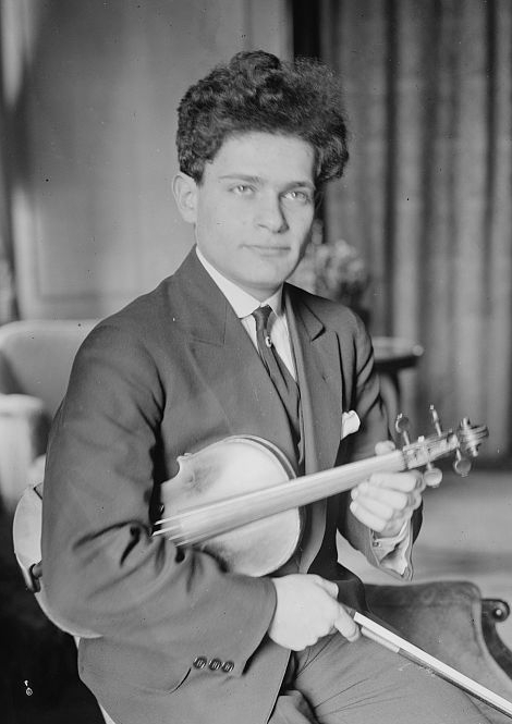 Russian violinist Toscha Seidel (1899-1962)